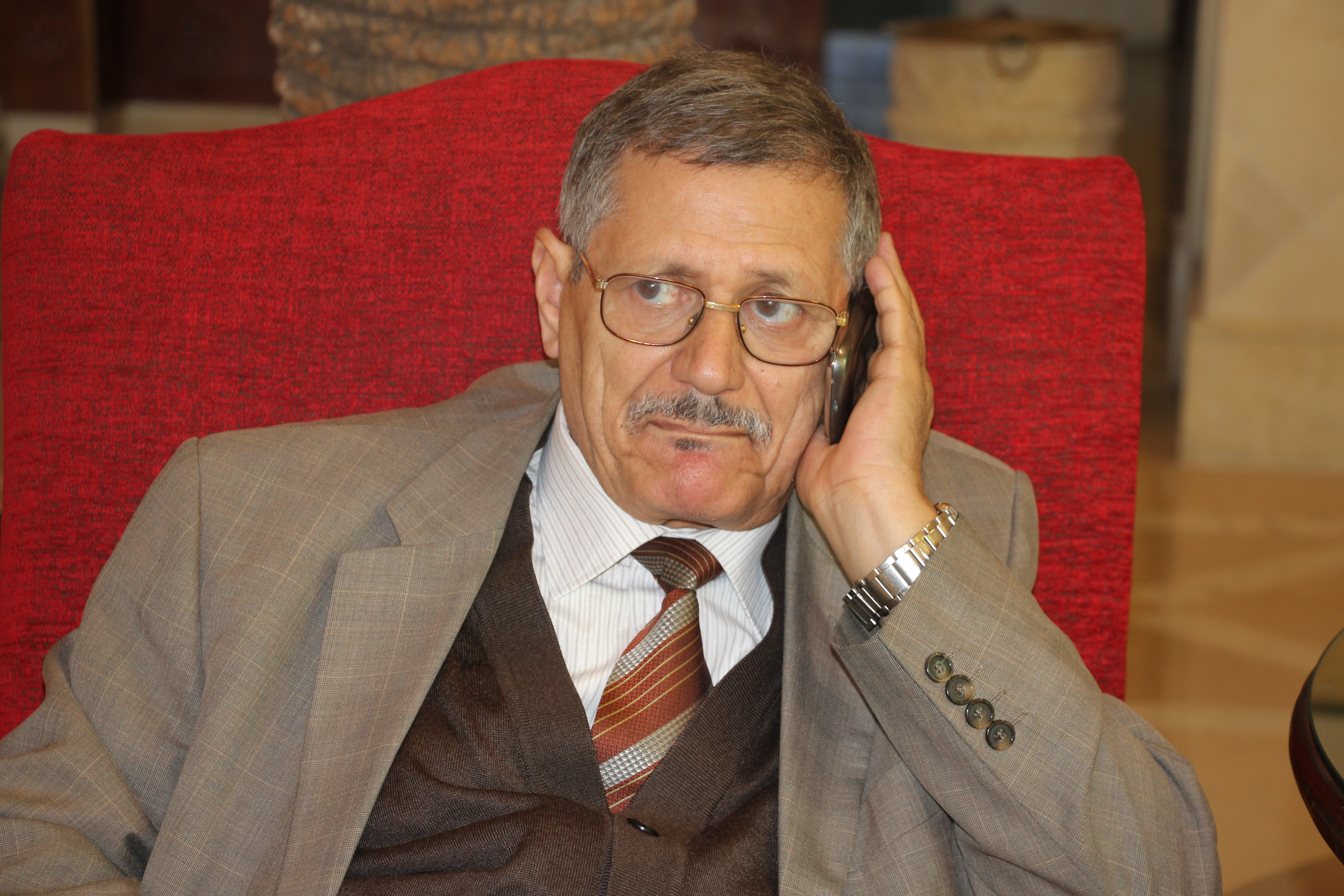 عبد المجيد النجار